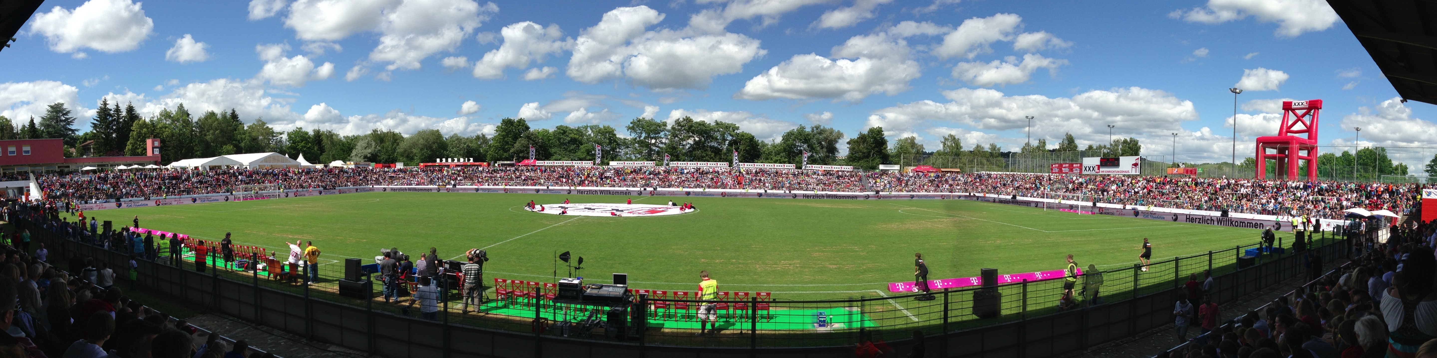 Benefiz-Fußballspiel zwischen der Dirk Nowitzki Stiftung und Manuel Neuer Stiftung in der Flyeralarm Arena, Würzburg.